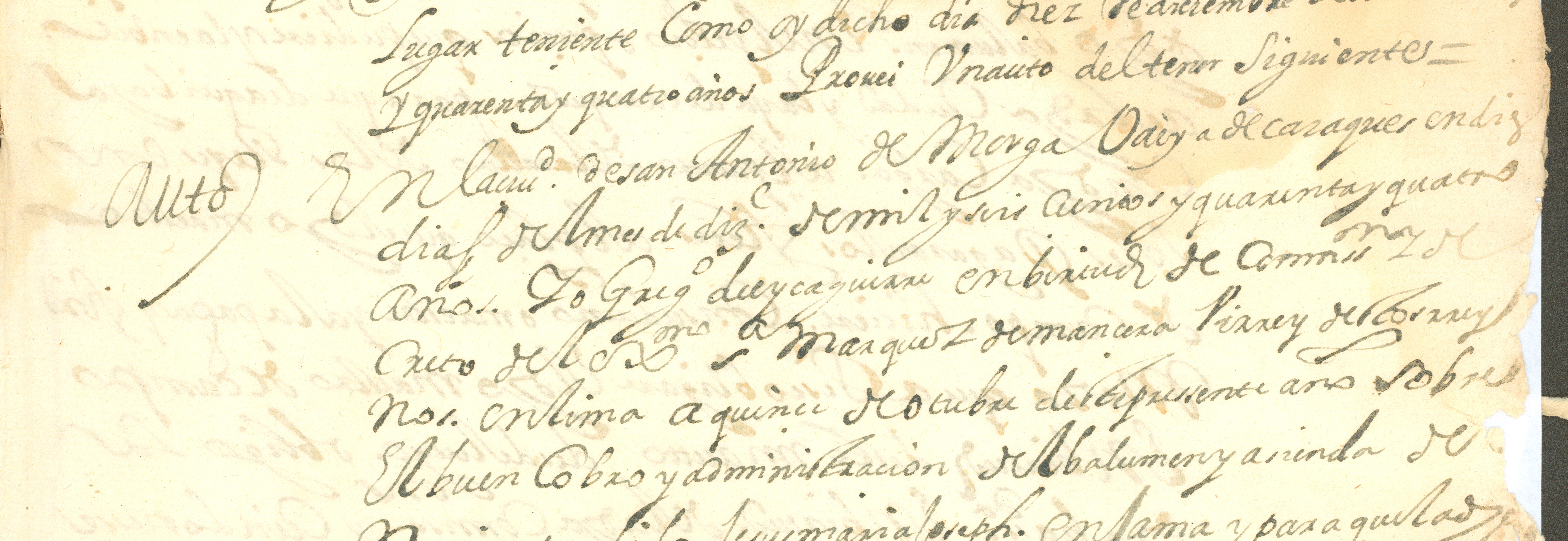 Diapositiva de acceso publico hallado en el Archivo Histórico del Guayas (AHG) - Guayaquil, Ecuador. Consultado y compartido por el usuario J. Javier García A.